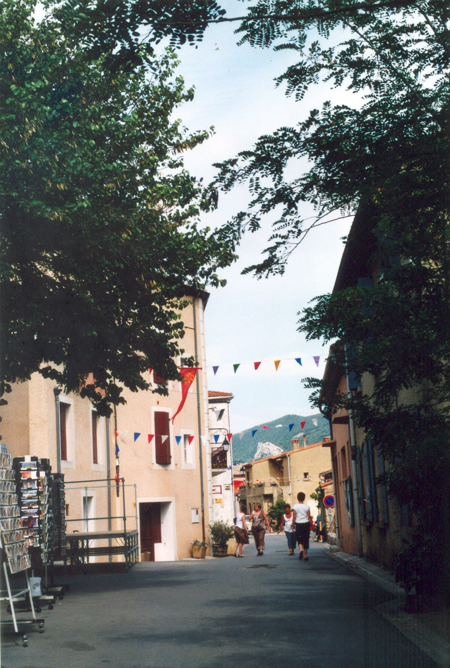 Cucugnan